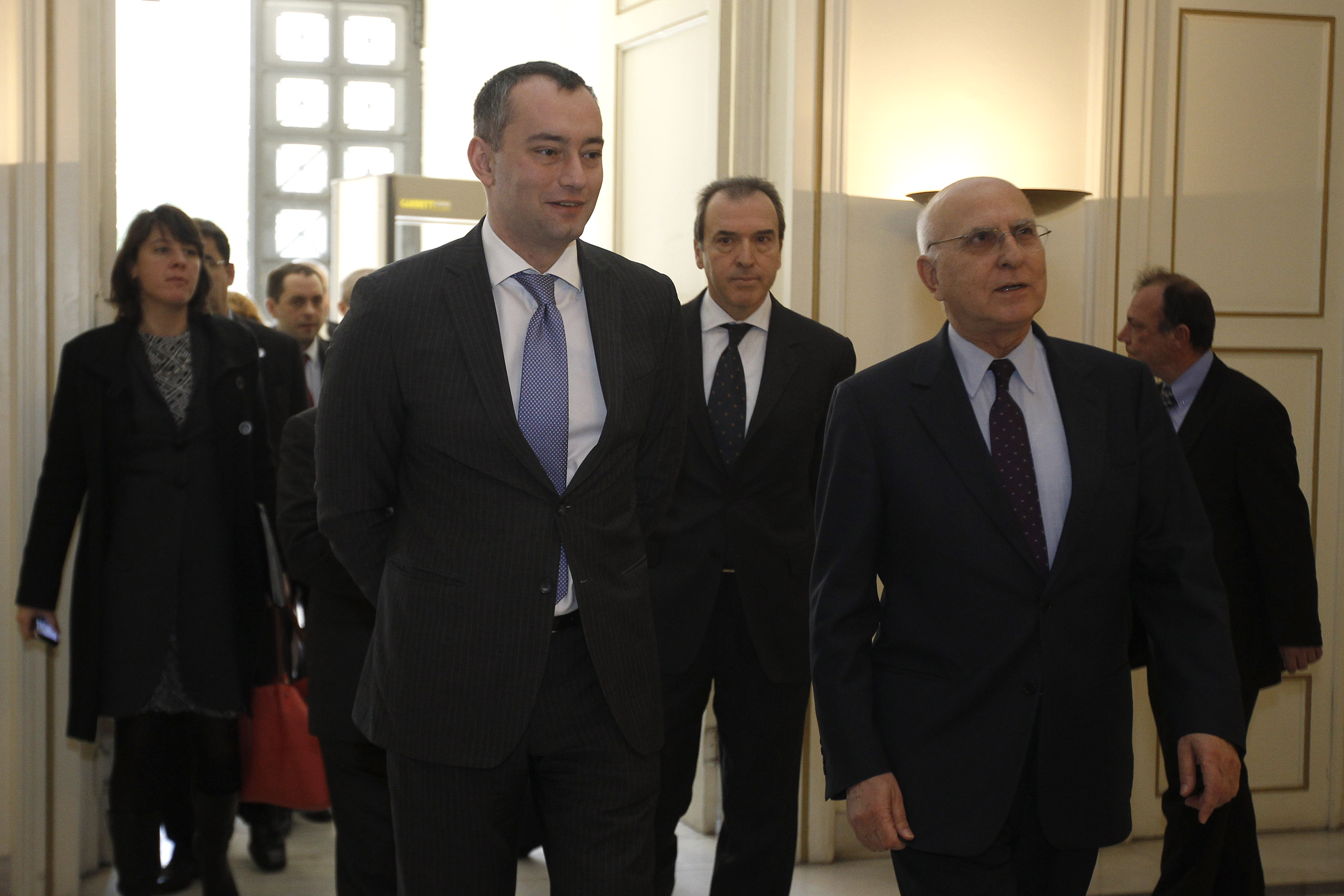 Στις 18 Ιανουαρίου 2012 συναντήθηκε ο ΥΠΕΞ Σ. Δήμας με τον ΥΠΕΞ Βουλγαρίας N. Mladenov και μετά τη συνάντησή τους ακολούθησαν δηλώσεις. Δείτε τις κοινές δηλώσεις των Υπουργών εδώ